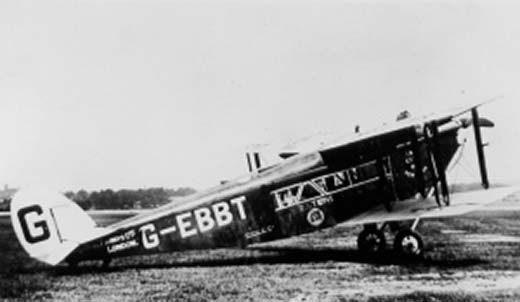 de Havilland DH.34 G-EBBT